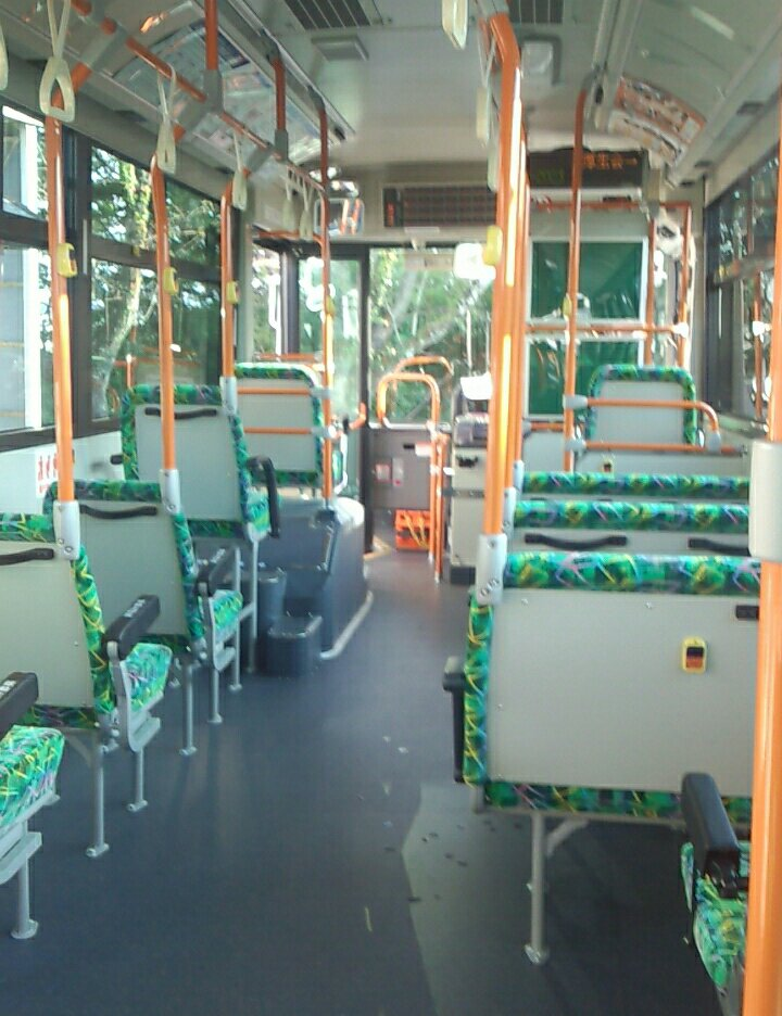 遠鉄バス車内